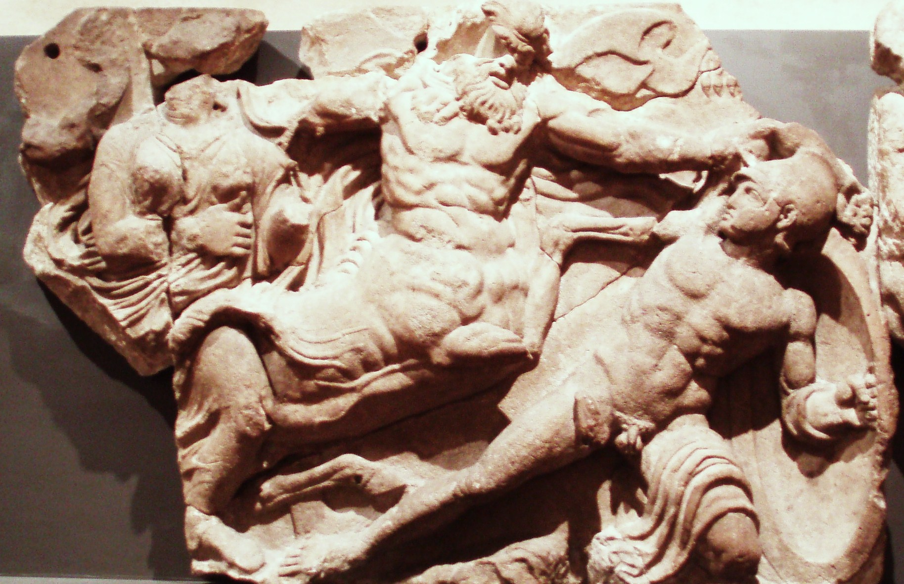 049 Bassae frieze British museum 420BC